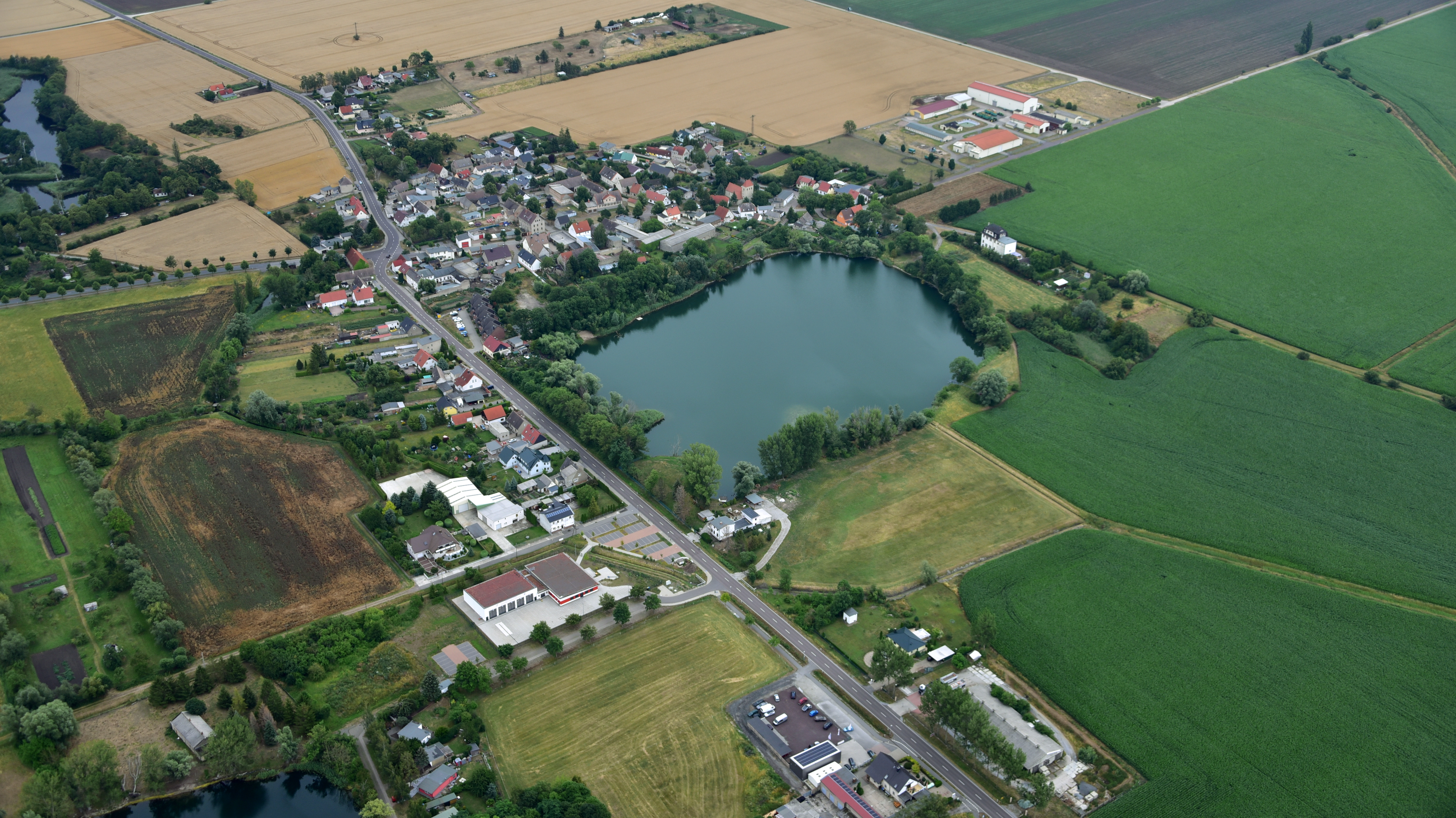 Üllnitz, Luftaufnahme (2019)